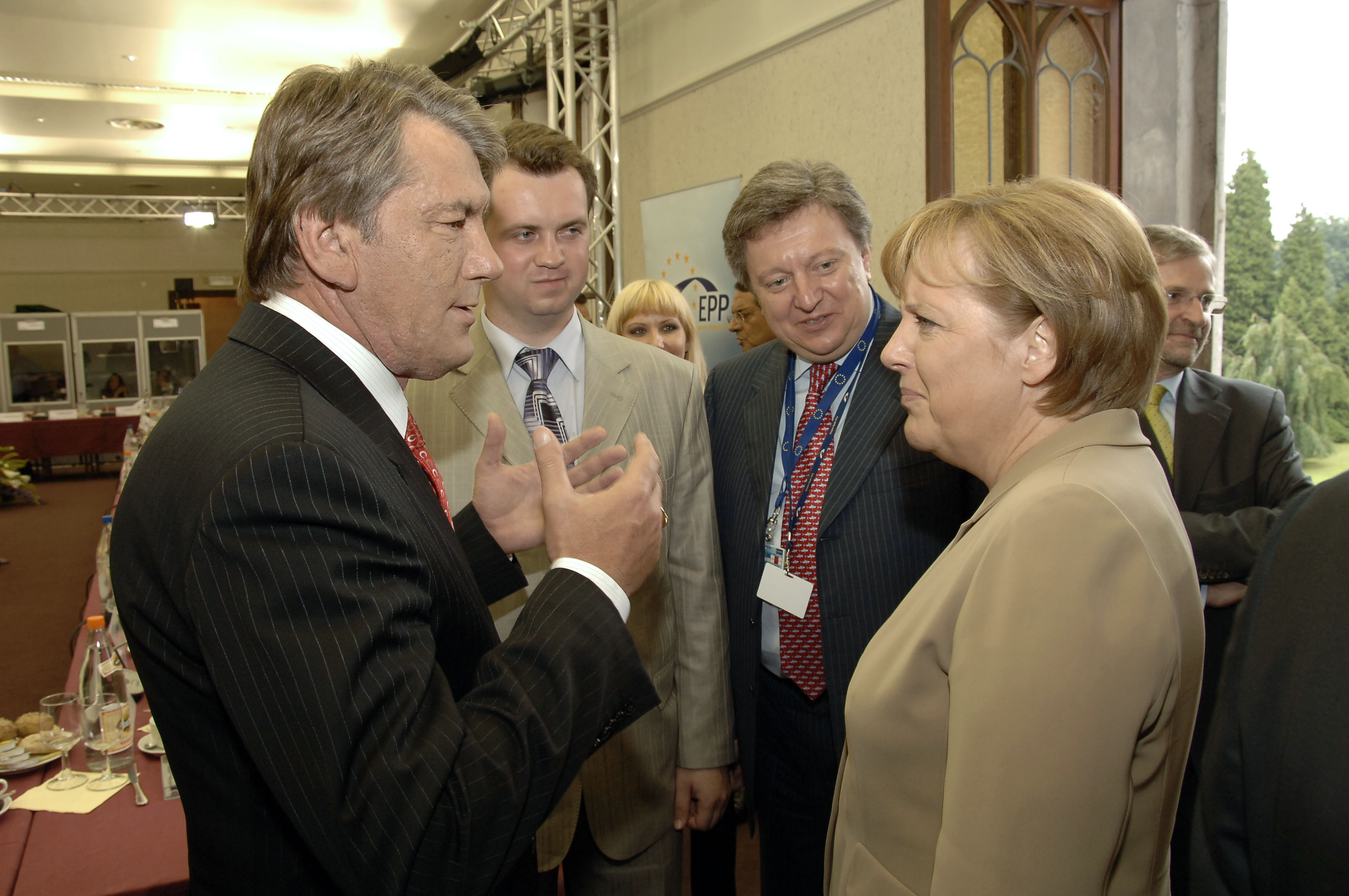 EPP Summit 21 June 2007